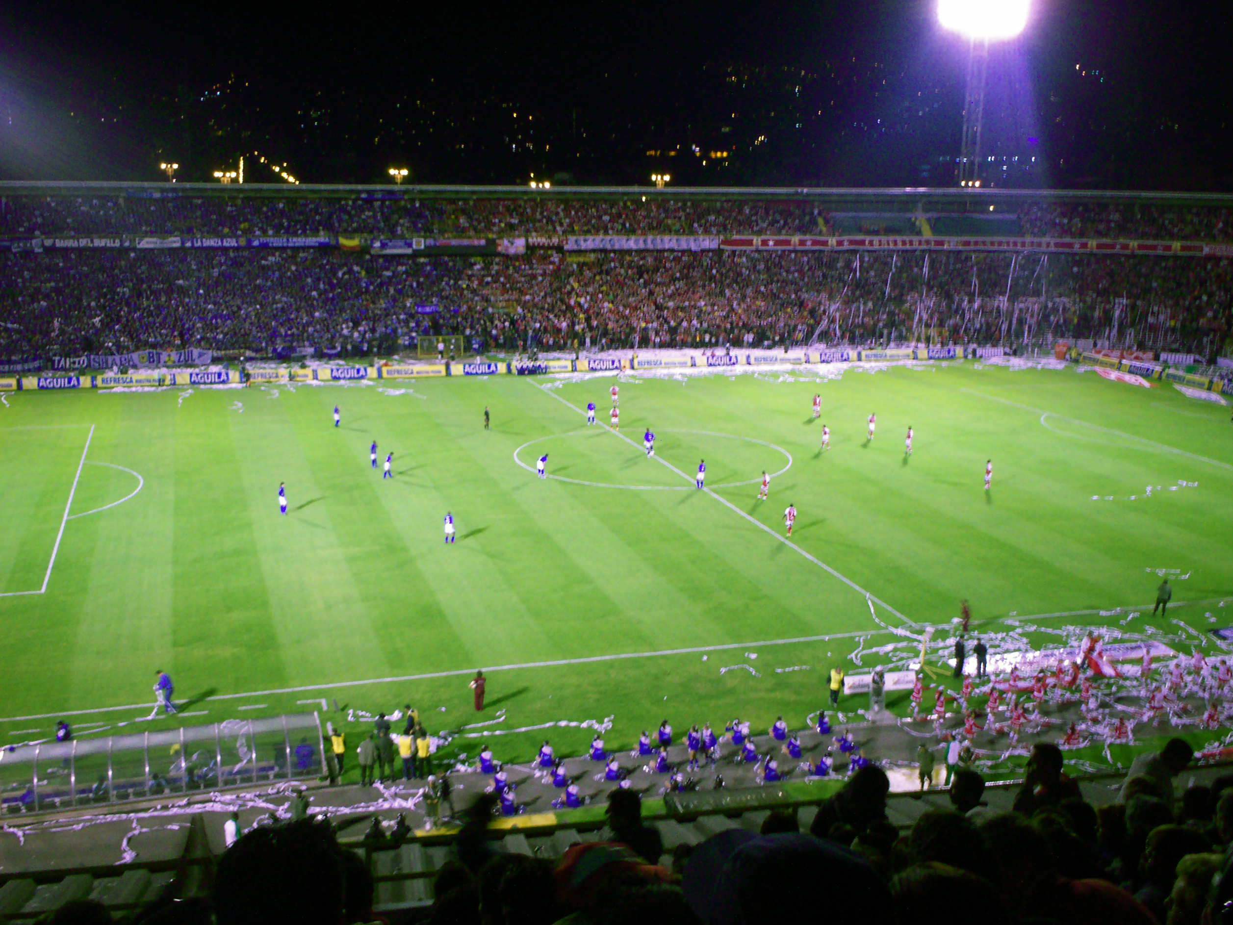 Clásico capitalino #250